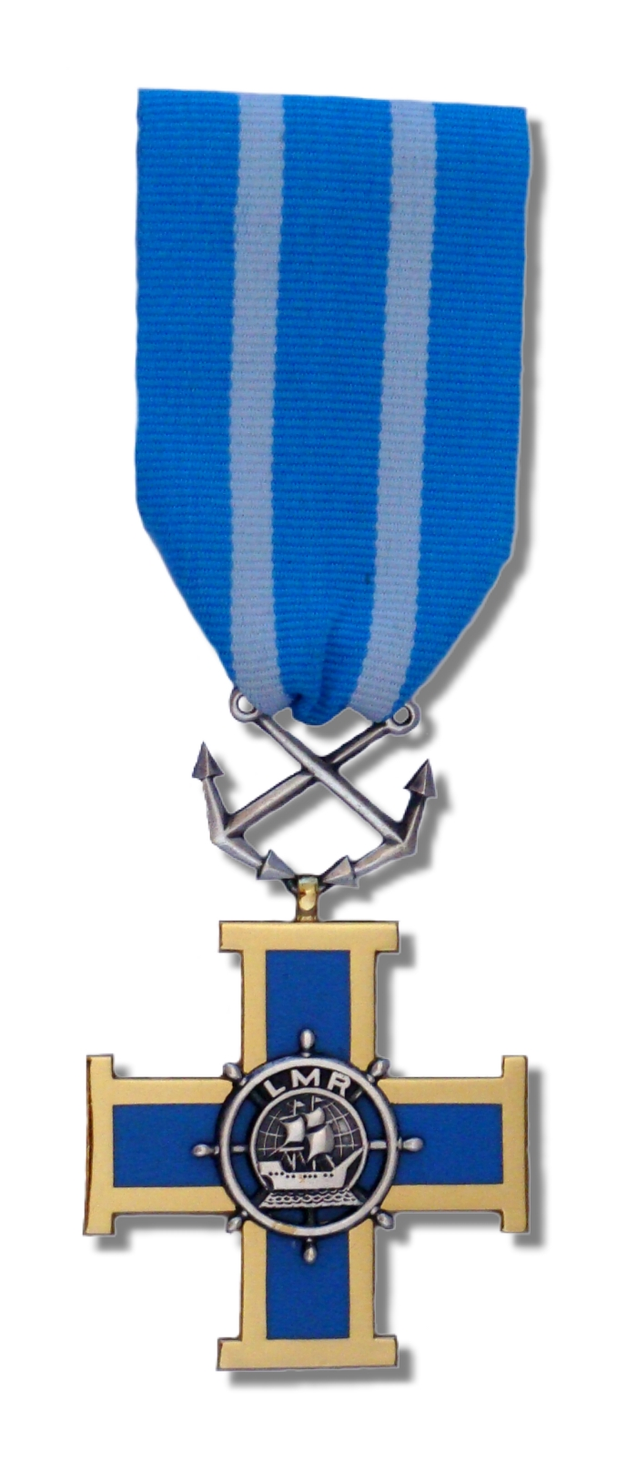 krzyż LMiR "Pro Mari Nostro"